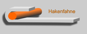 Verbindung Hakenfahne